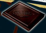 Chocolat